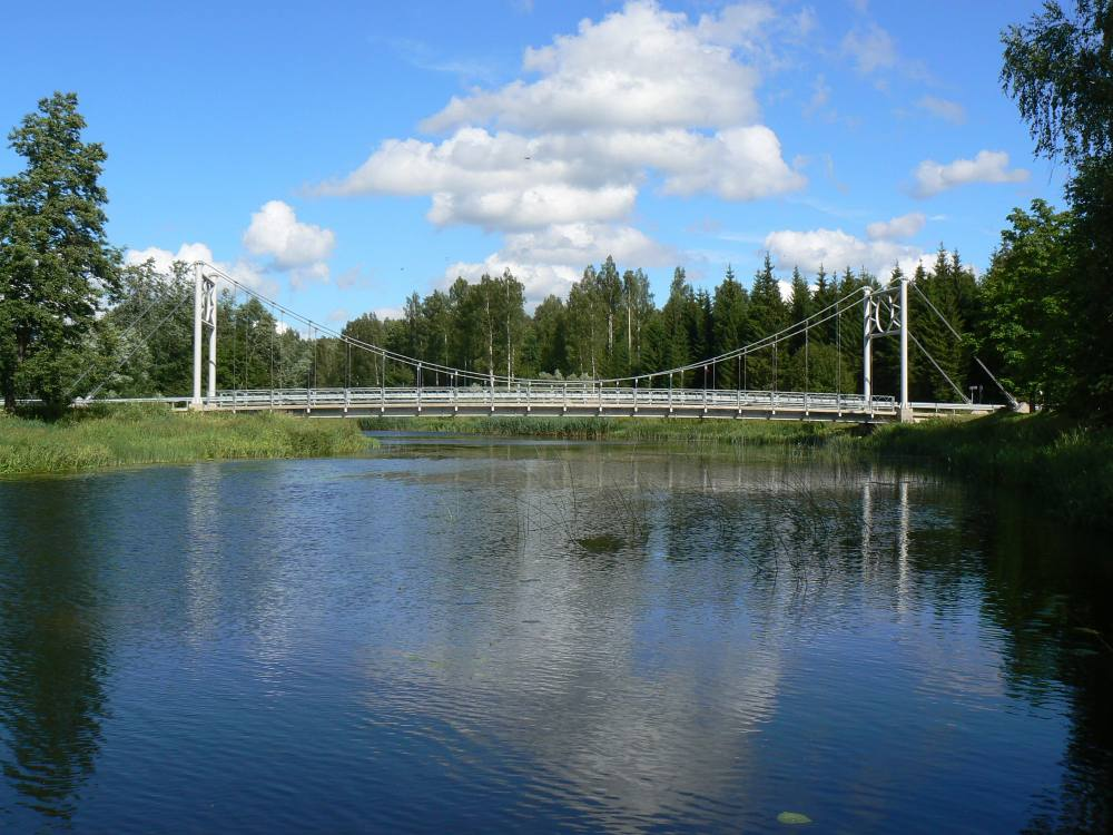 Kurgja rippsild